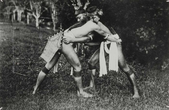 Foto. Twee worstelende Kenja Dajaks